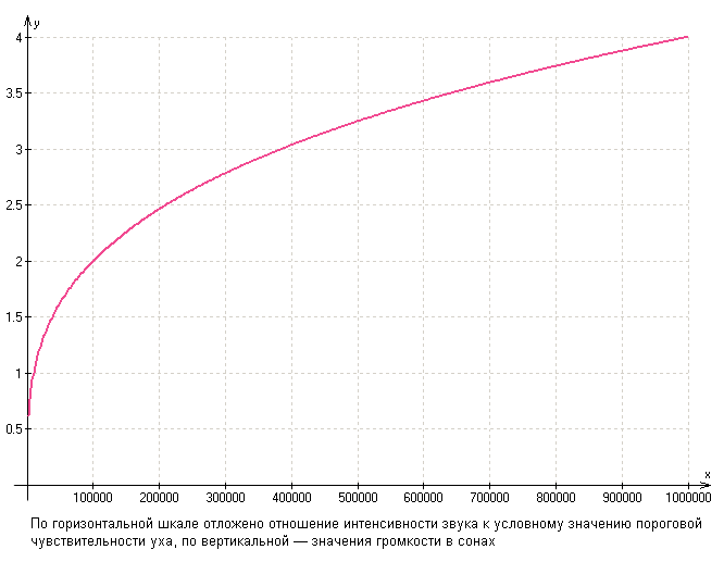 График зависимости значений громкости в сонах от интенсивности звука